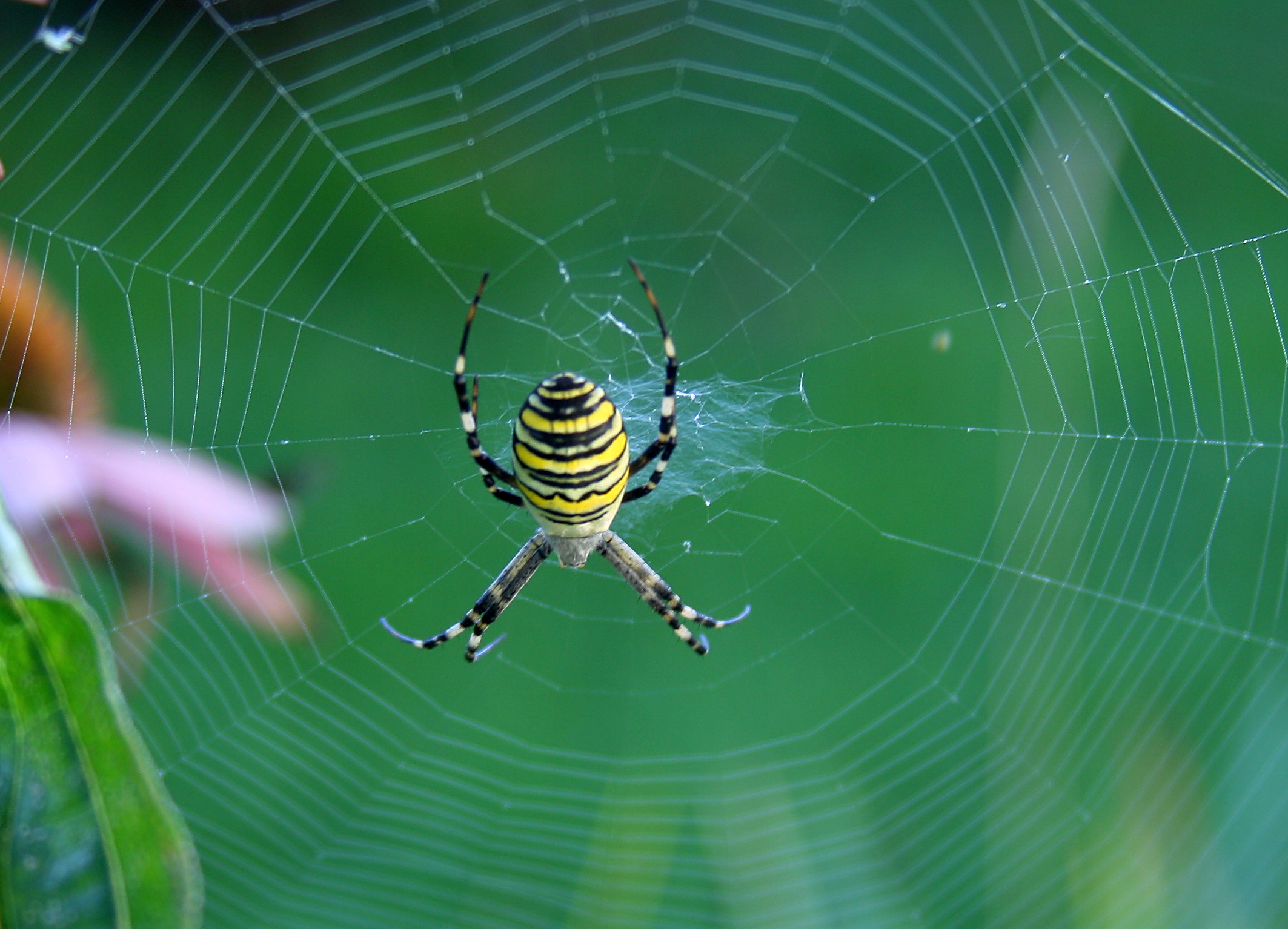 Аргиопа Брюнниха